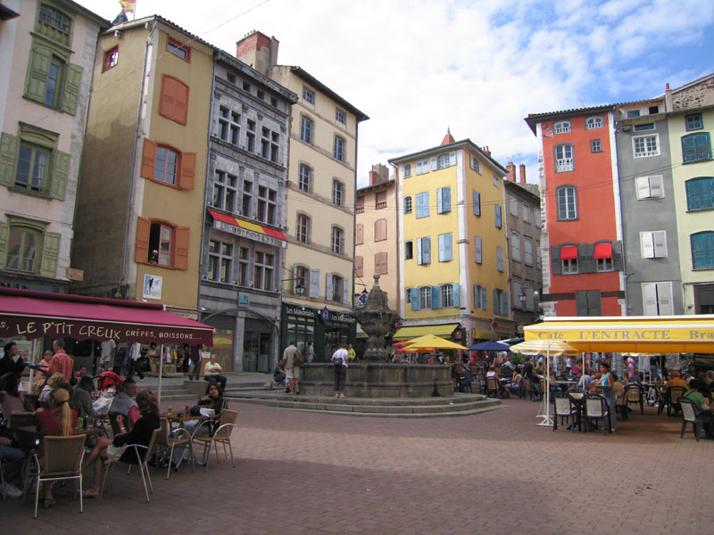 Le Puy-en-Velay, place animée